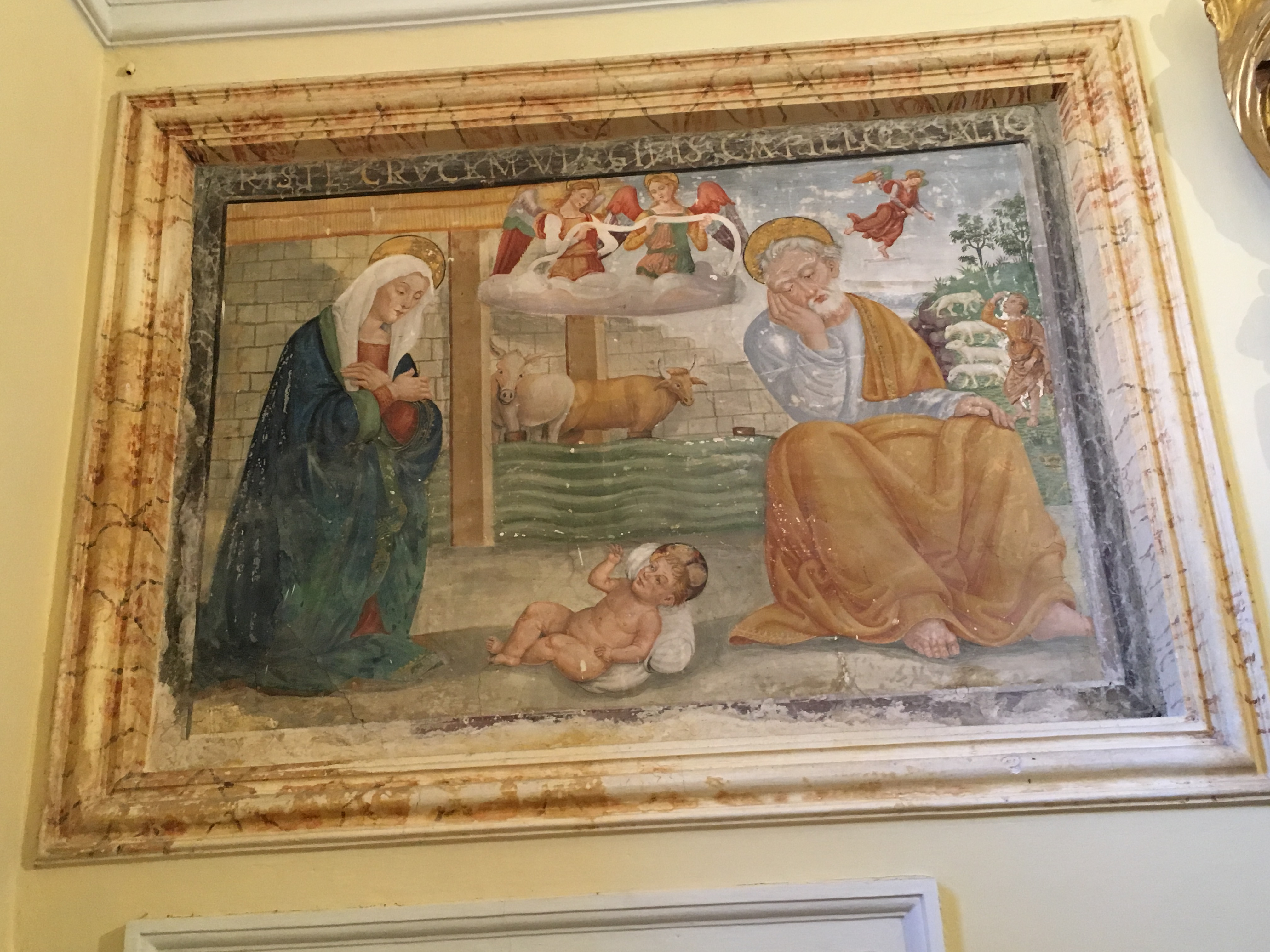 Santuario Madonna della Bianca. Autore Lo Spagna